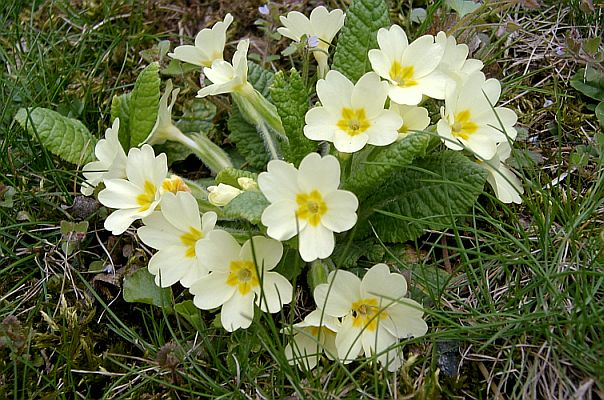 wilde Primeln. selbst fotografiert 4/2004 (GNU) K@rl 16:19, 31. Jul 2004 (CEST)